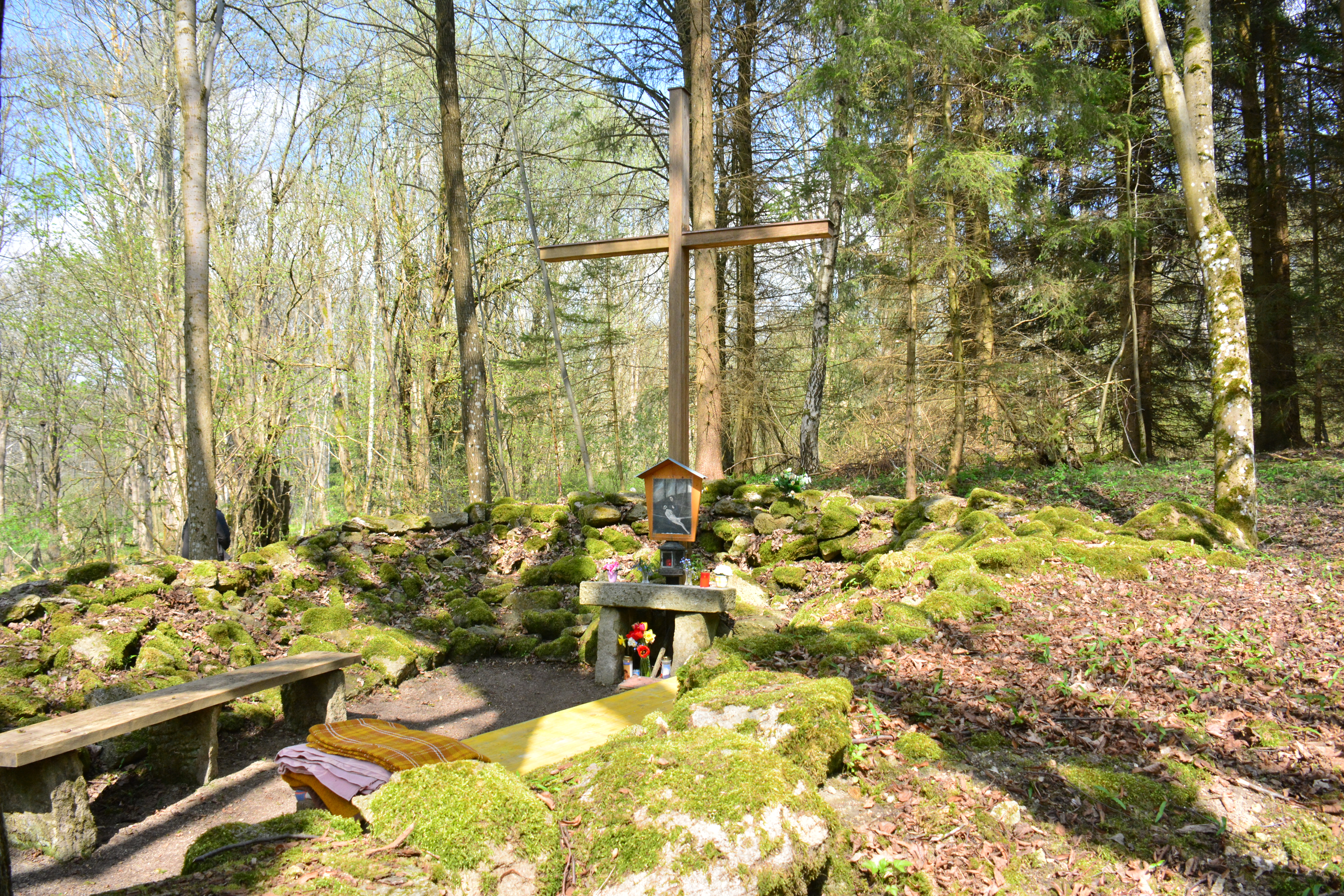 Das ehemalige Dort Romau / Romava bei Staré Město pod Landštejnem im Okres Jindřichův Hradec (Bezirk Neuhaus)